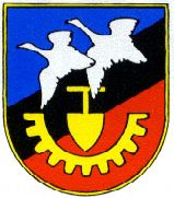 wappen gemeinde bürmoos gemeinfrei